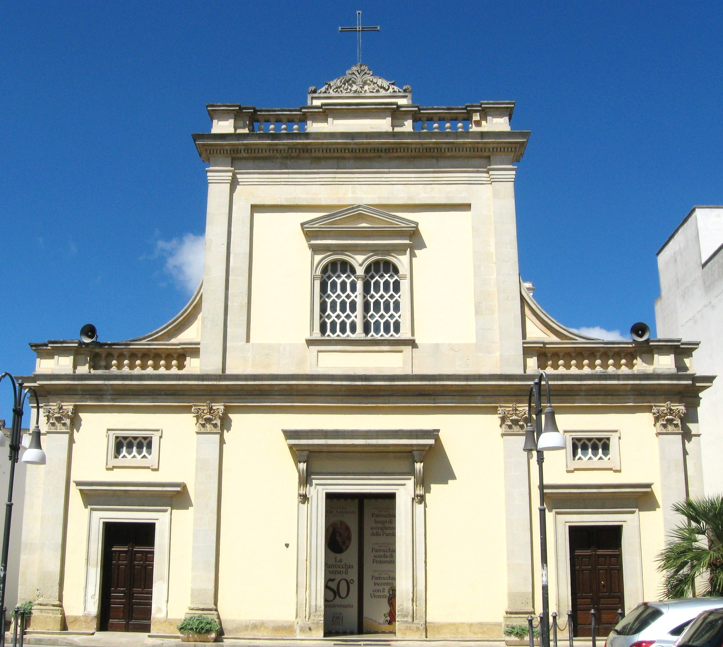 Chiesa della beata Vergine Maria Addolorata